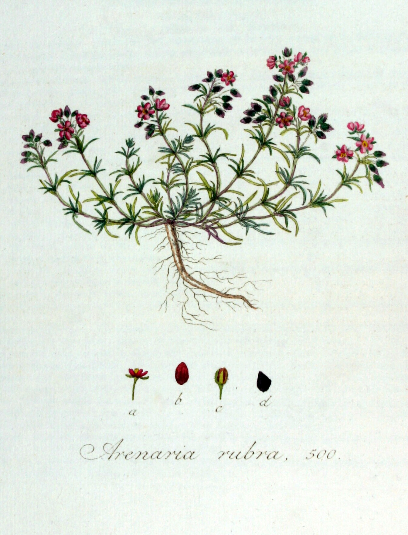 Spergularia rubra (L.) J. & C. Presl (Syn. Arenaria rubra L.)